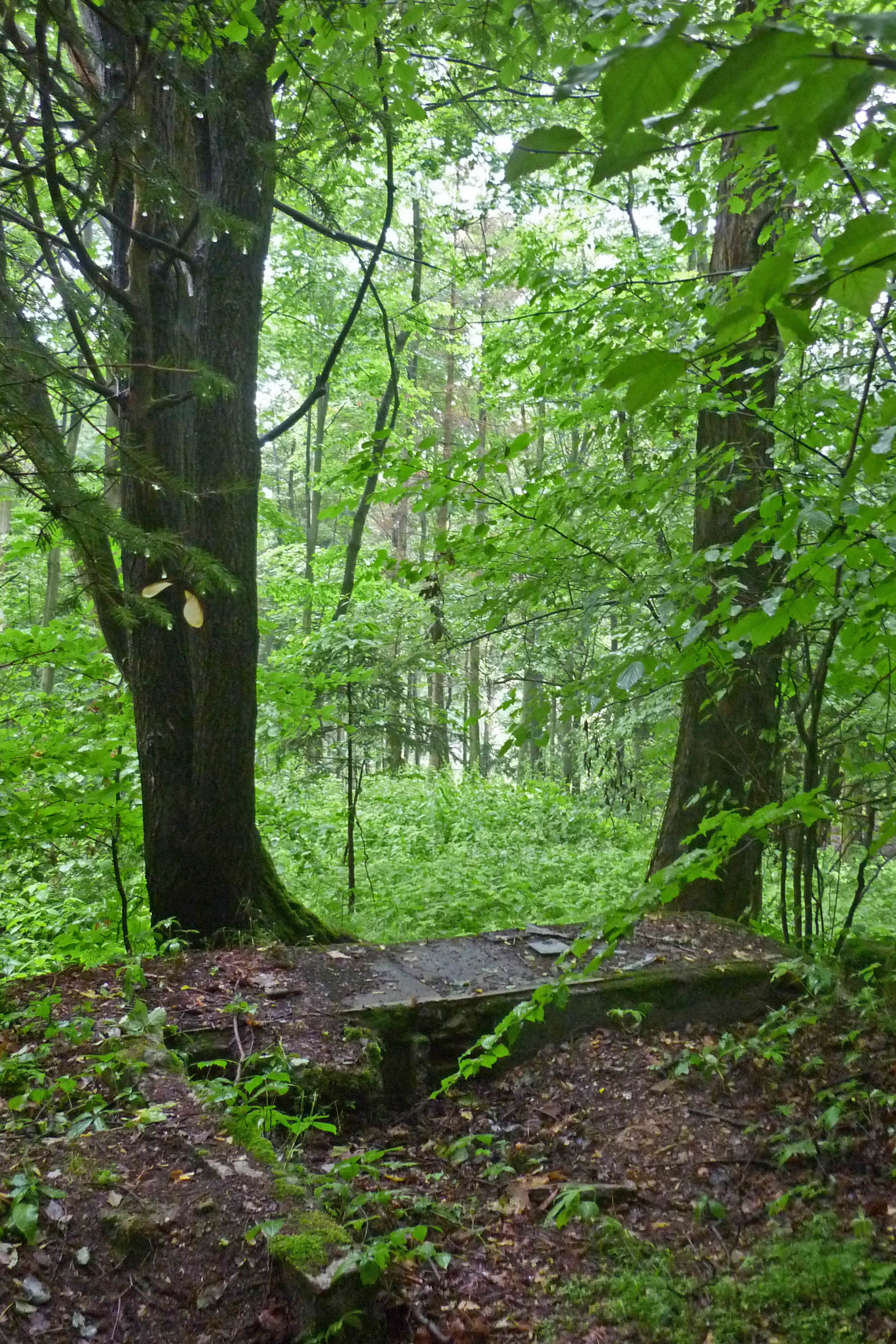 Reste der Grundmauern der ehemaligen Rosenbaude auf dem Rosengarten-Berg (Różanka, 628 m) am Bleibergkamm im Bober-Katzbach-Gebirge